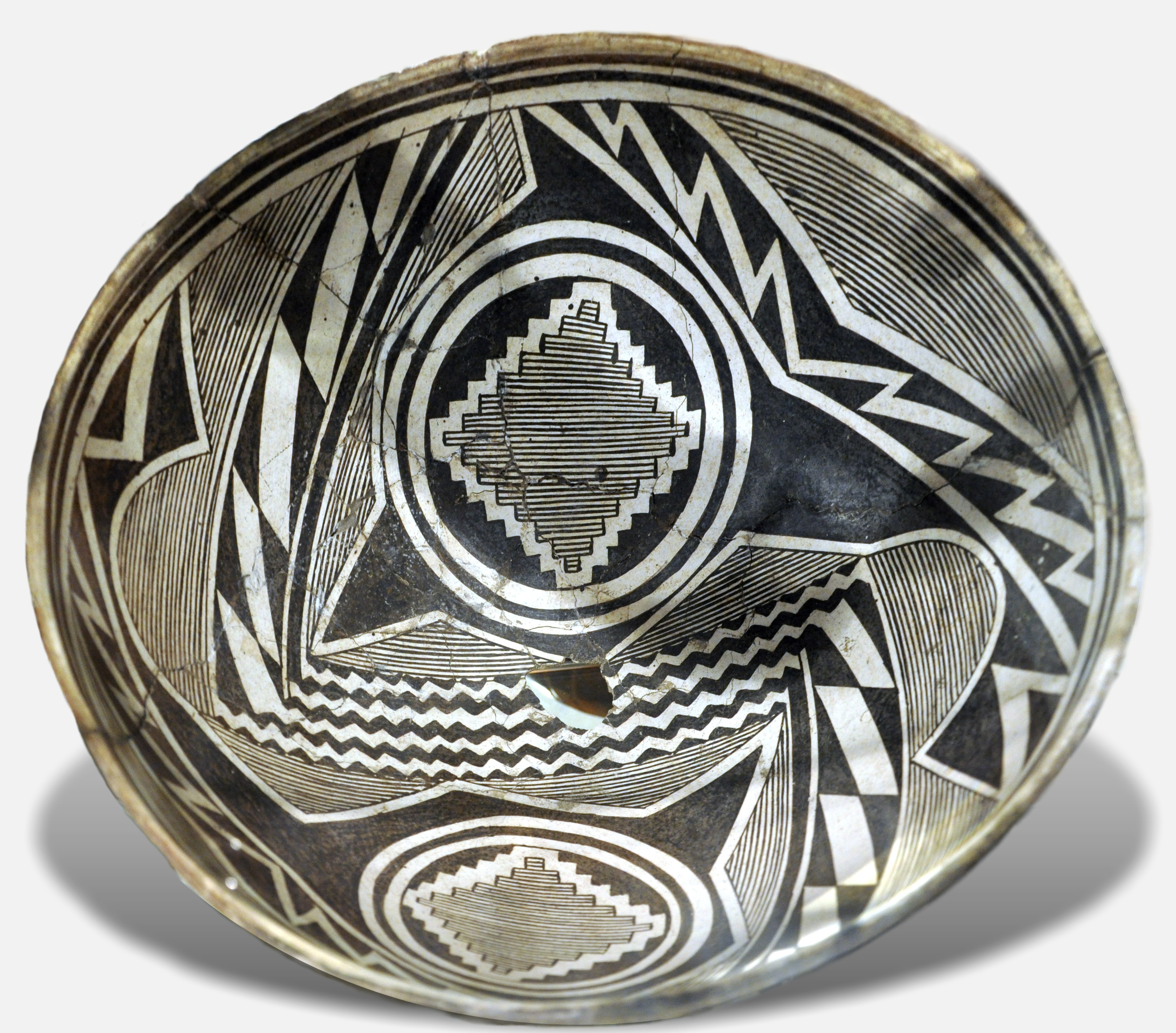 Zürich, Museum Rietberg, Schaudepot, altamerikanische Töpferei (Mogollon-Kultur?)